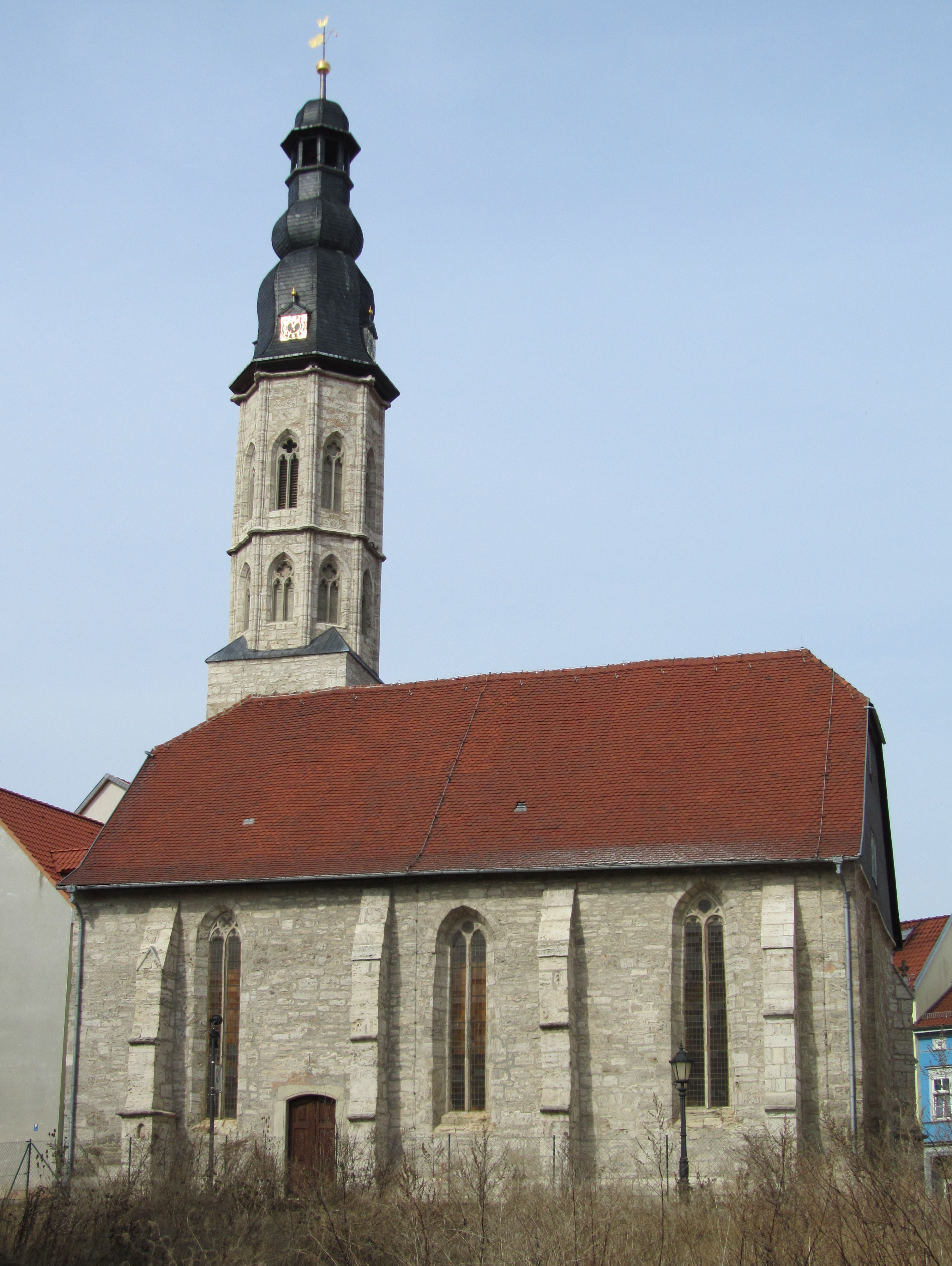 Die Allerheiligenkirche in Mühlhausen (Thüringen).